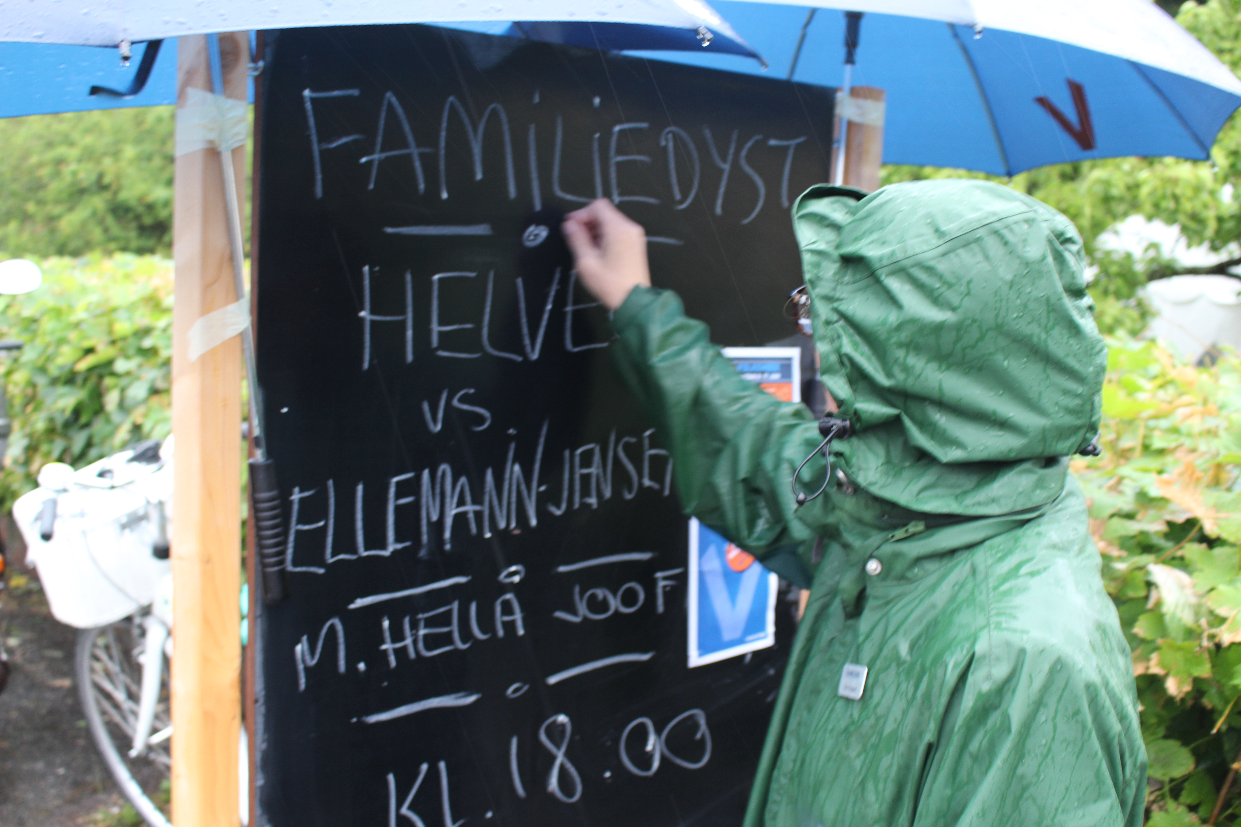 Tavle med annoncering af politikerfamiliedyst mellem Helveg Petersen og Ellemann-Jensen styret af Hella Joof under Folkemødet 2016 foran Venstres stand med kvinde der skriver med kridt.